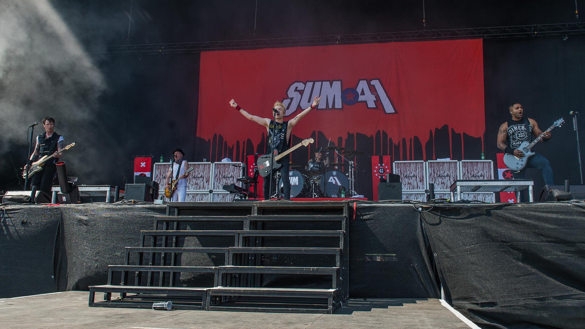 ARGO-Konzerte,Dave Baksh,Deryck Whibley,Frank Zummo,Jason McCaslin,Konzert,Livekonzert,Livemusik,Musik,RiP,Rock im Park 2017,Sum 41,Tom Thacker,Zeppelin Stage